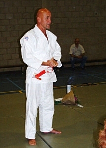 Jan Snijders